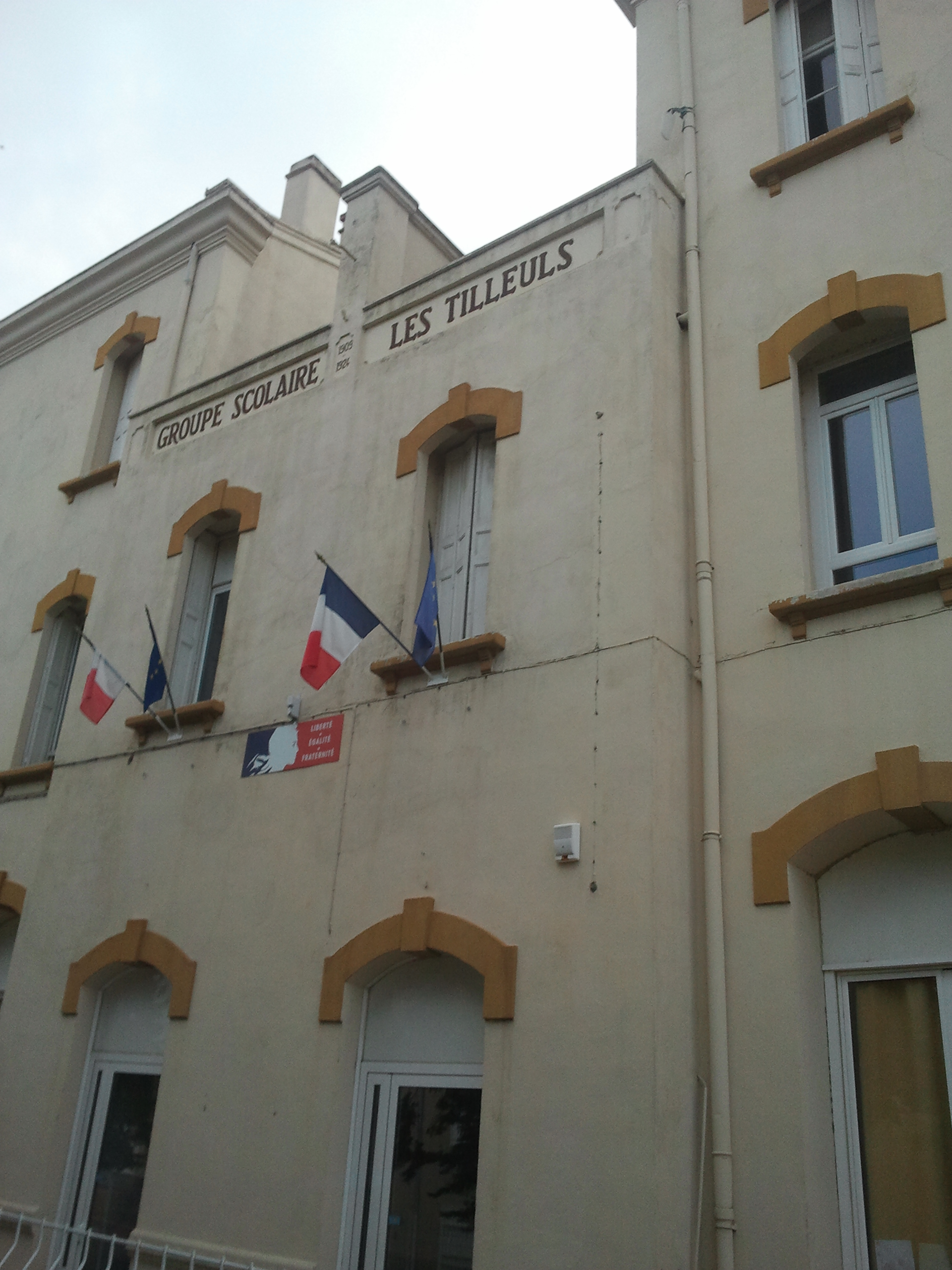 Groupe scolaire Les Tilleuls à Corneilla-la-Rivière